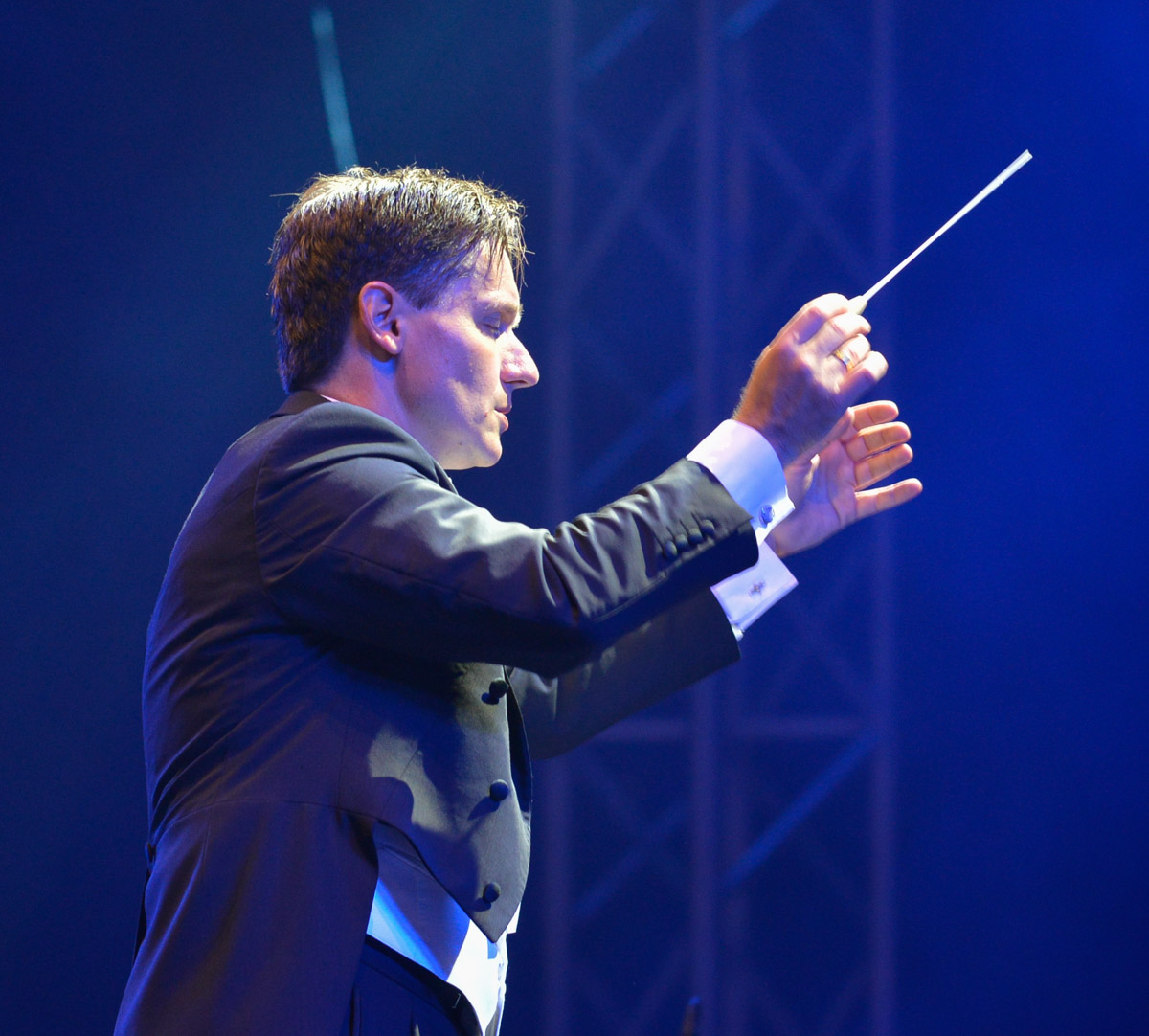 Stefan Klingele på Gustav Adolfs torg under Stockholms Kulturfestival 2014.